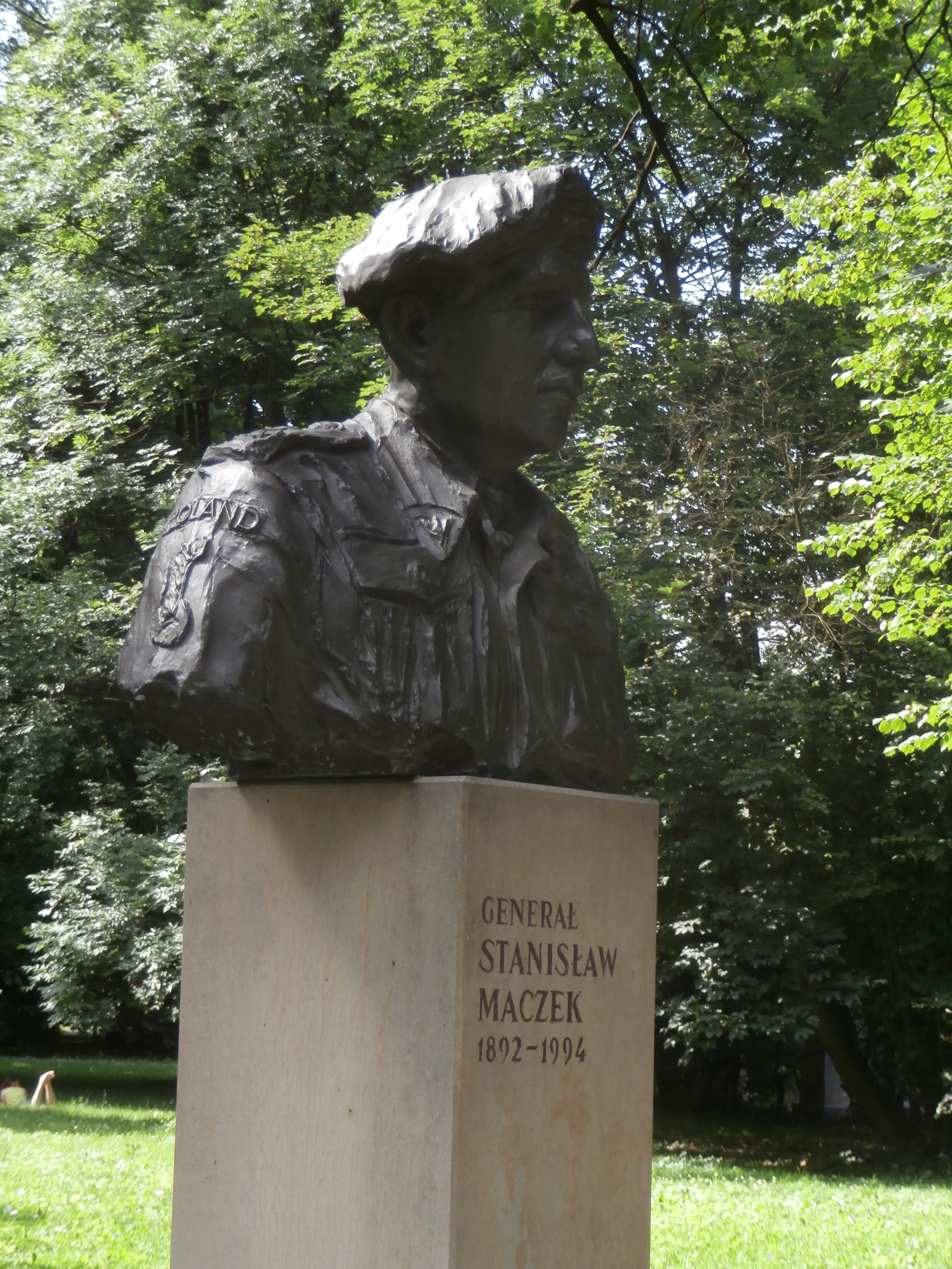 Pomnik generała Stanisława Maczka w Krakowie, w Parku Jordana.